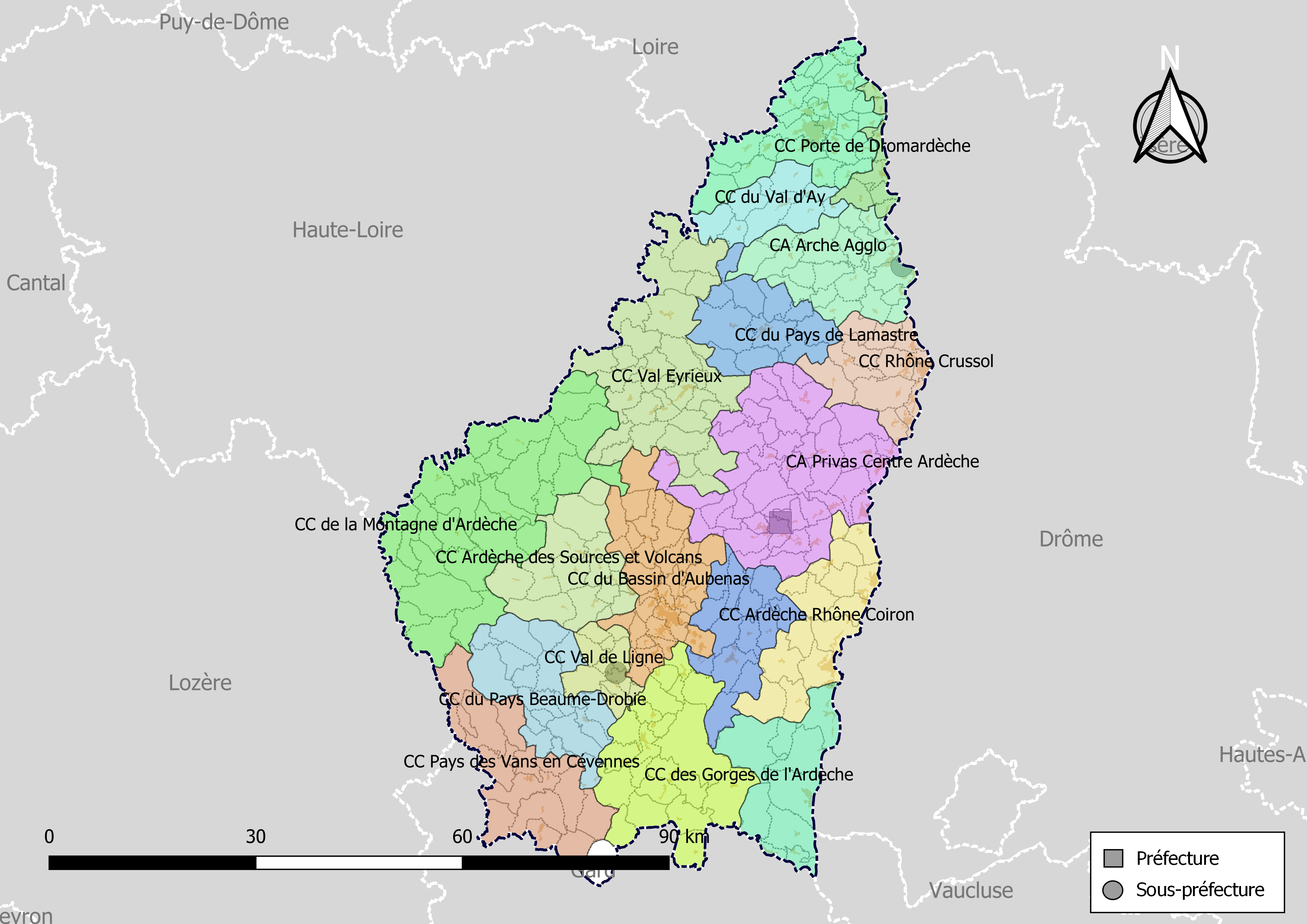 Carte des intercommunalités du département de l'Ardèche, France. Composition au 1er janvier 2019.